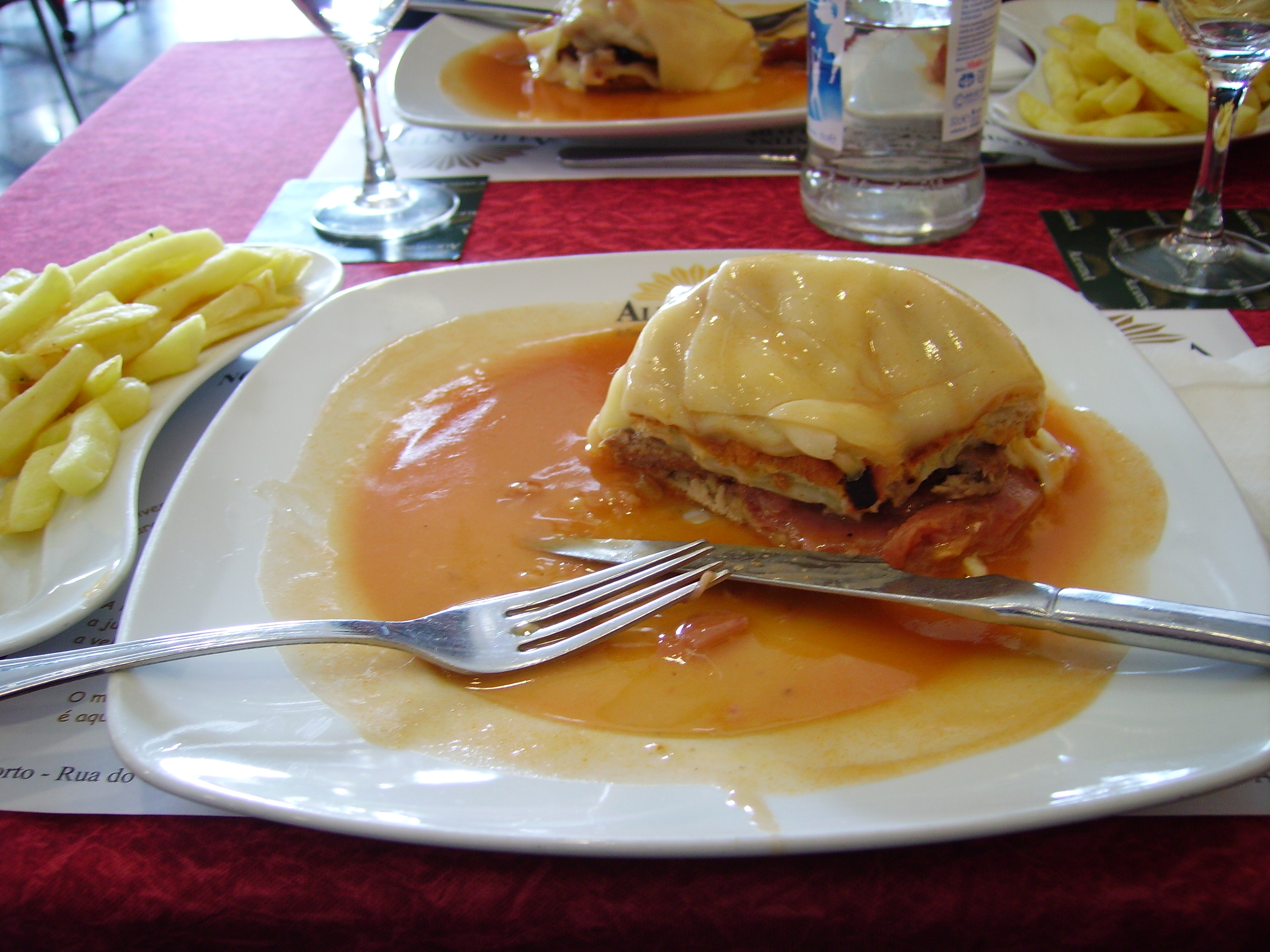 A Francesinha